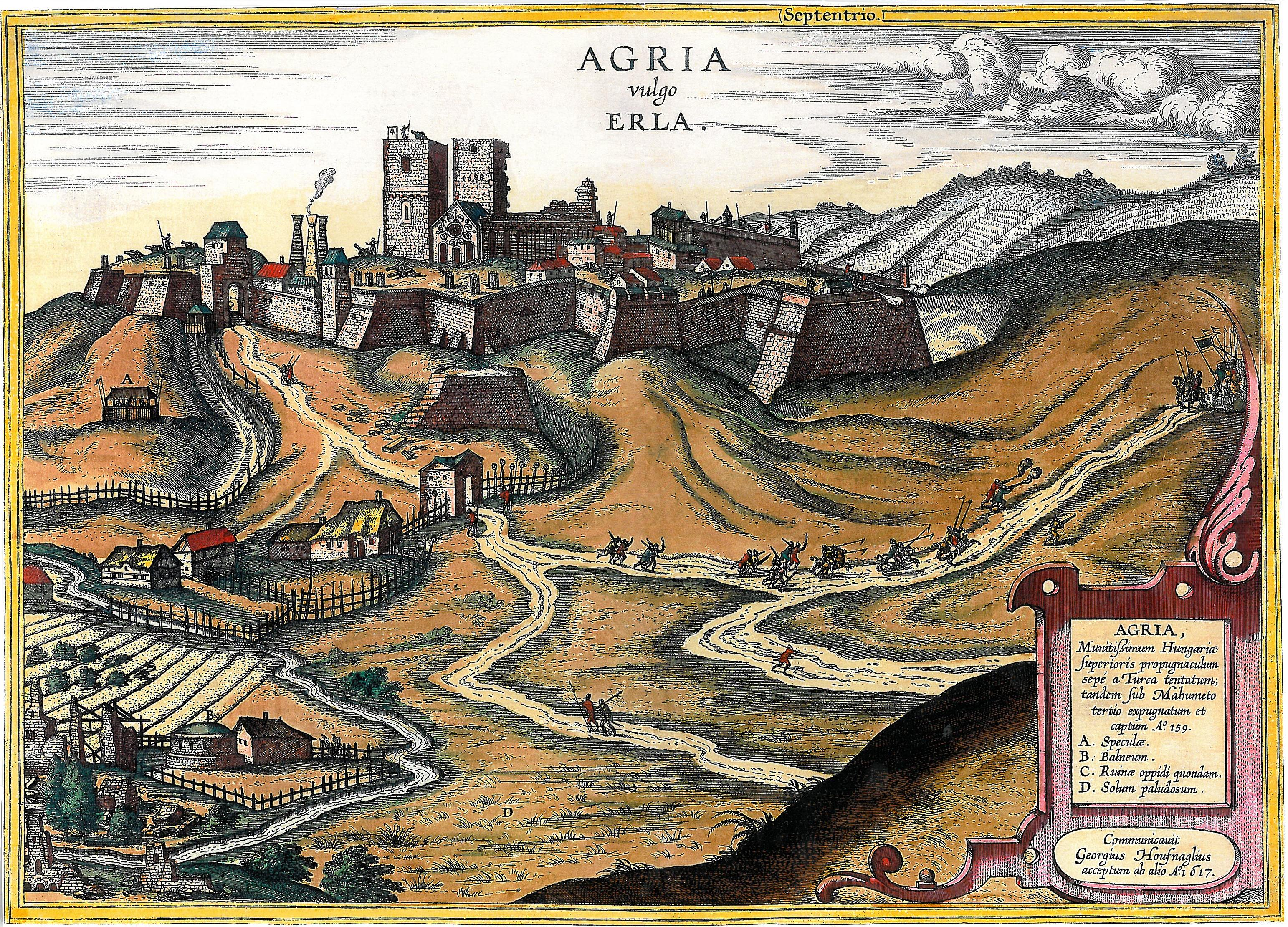 Eger (Agria) G Hoefnagel metszetén, a XVI. század végén